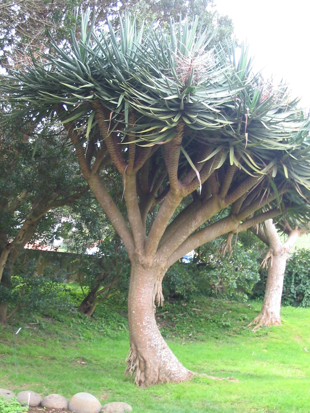 Drachenbaum (Dracaena draco) - Habitus